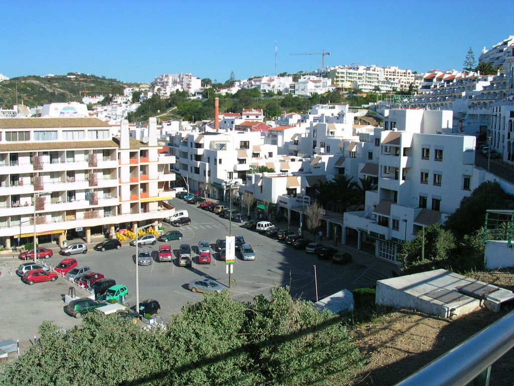 Albufeira Valter Jacinto